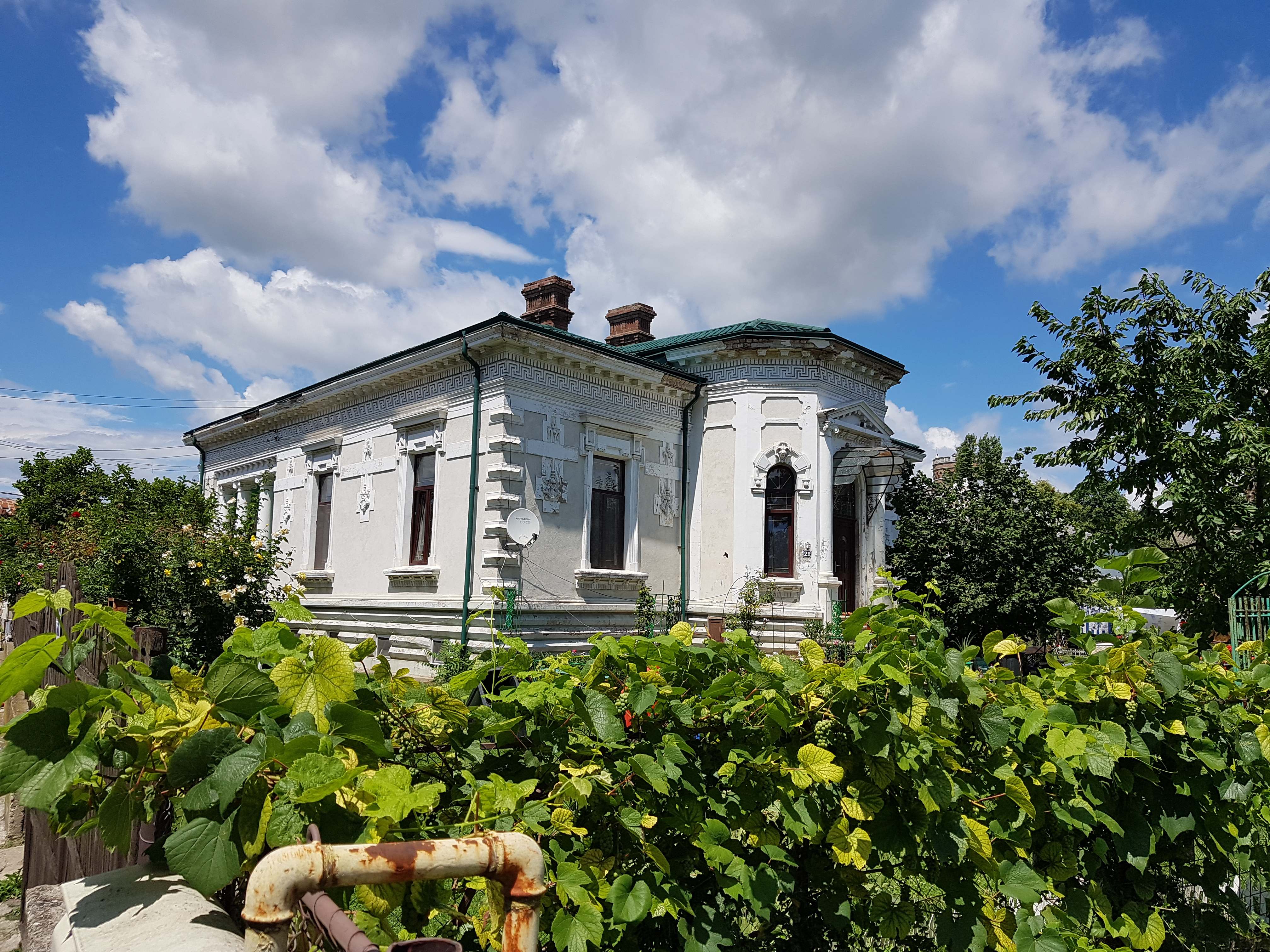 Casa A. S. V. Lucaciu